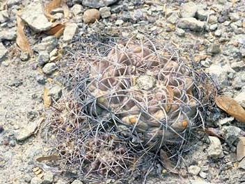 Sobradinho, Bahia, Brasil